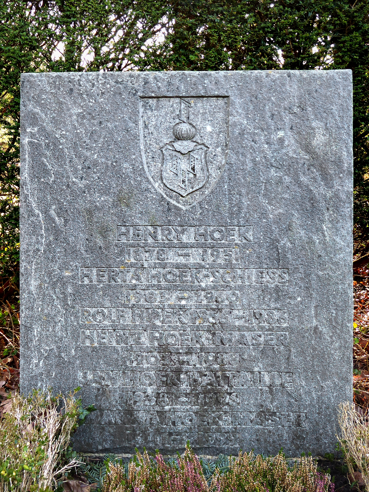 Henry Hoek (1878–1951) Geologe, Meteorologe, Bergsteiger, Skipionier, Autor, Familiengrab auf dem Friedhof Hörnli, Riehen, Basel-Stadt